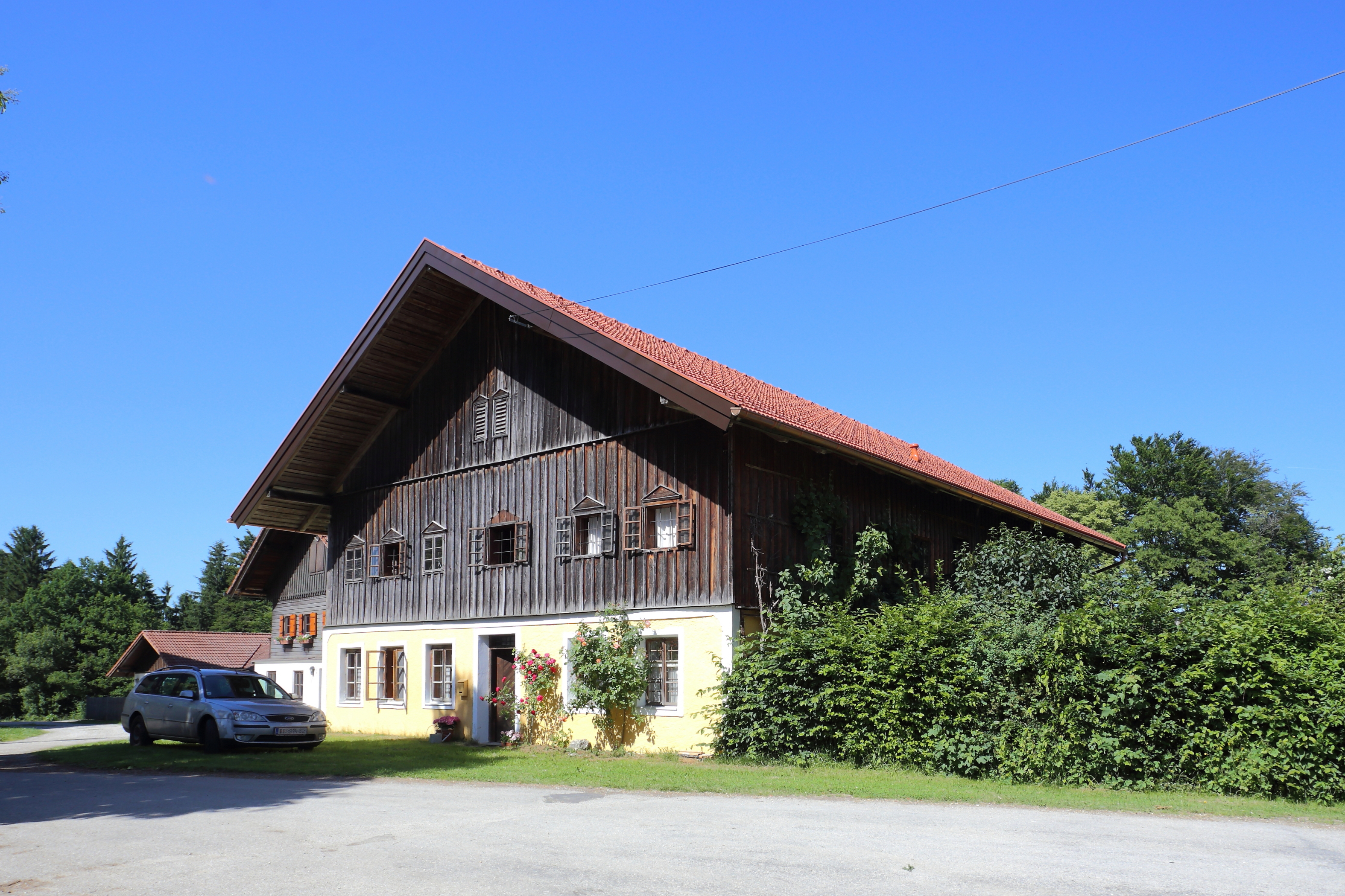 Ehemaliges Mesnerhaus in Hart, ein Ortsteil der oberösterreichischen Gemeinde Pischelsdorf am Engelbach.